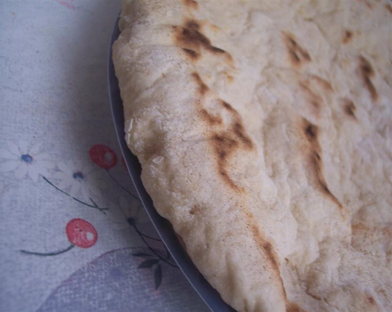 Kendim cektim, telifini kamu mali olarak tayin ediyorum.